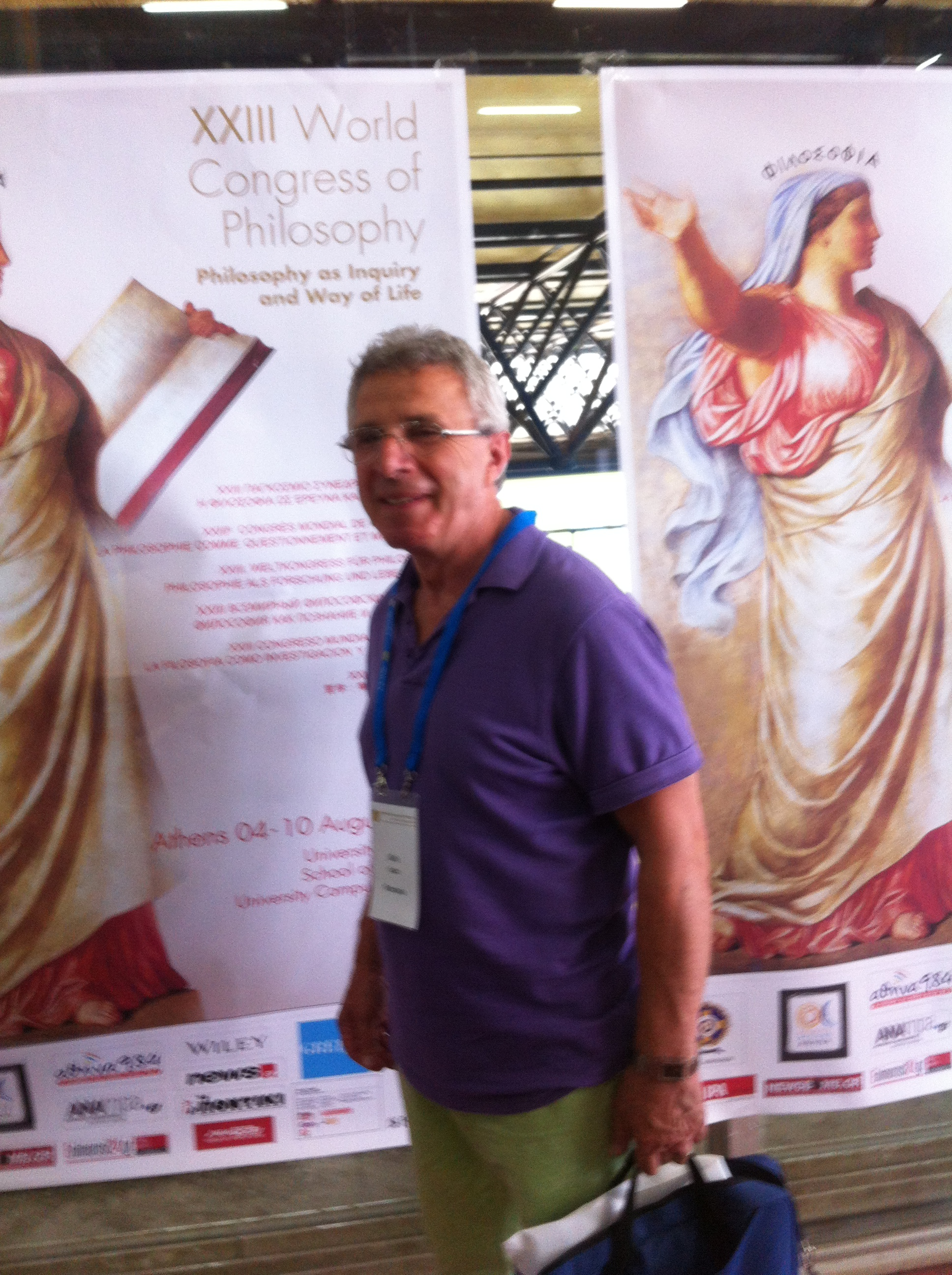 Ioan Biris, Congresul de la Atena 2013